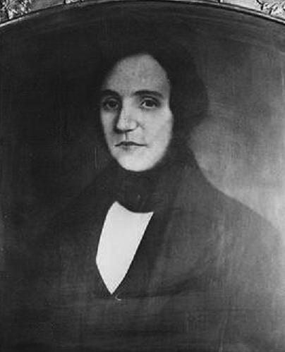 Portrait de Joseph Bourret, maire de Montréal, de 1844 à 44 et de 1847 à 1849